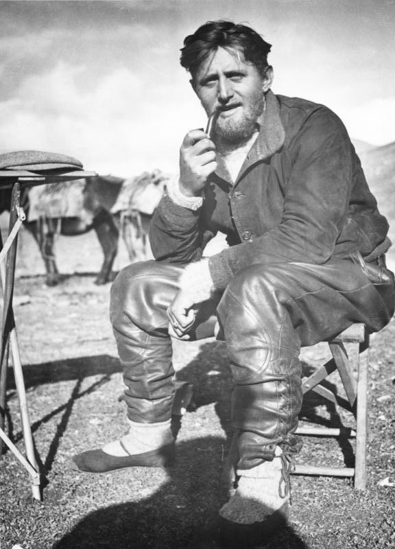 Tibetexpedition, Edmund Geer Lager Gayamtsona [Gyamtsona]-See, Geer